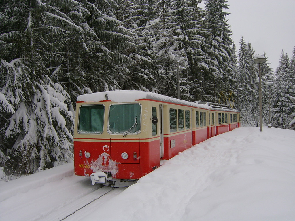 Ozubnicová železnica Štrba-Štrbské Pleso